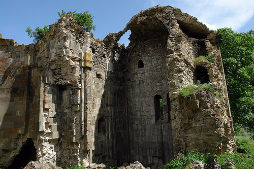 Tbeti in Tao-Klarjeti